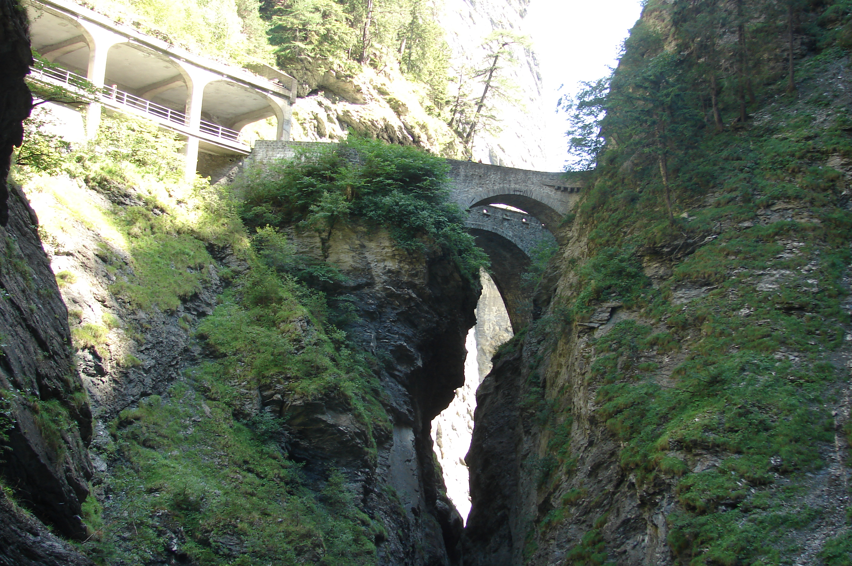 Via Mala